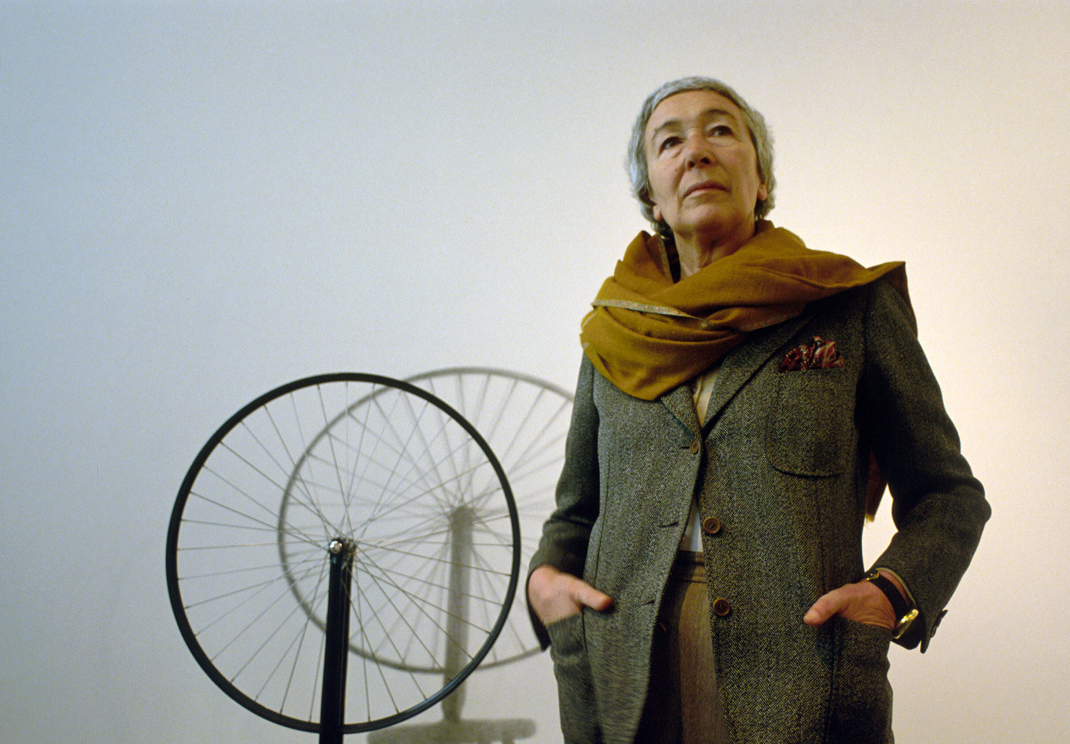 L'architetto Gae Aulenti a Palazzo Grassi di Venezia nel 1986